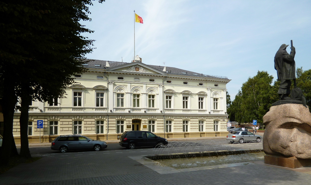 Klaipėda - ehemaliges Rathaus - von 1807-1808 lebte hier Friedrich Wilhelm III., König von Preußen, und seine Frau Luise